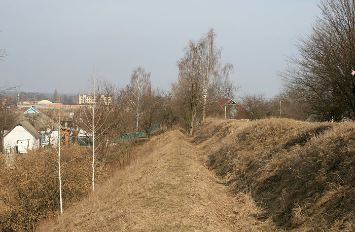 Зміїні вали Таращі: Зміїні вали Таращі